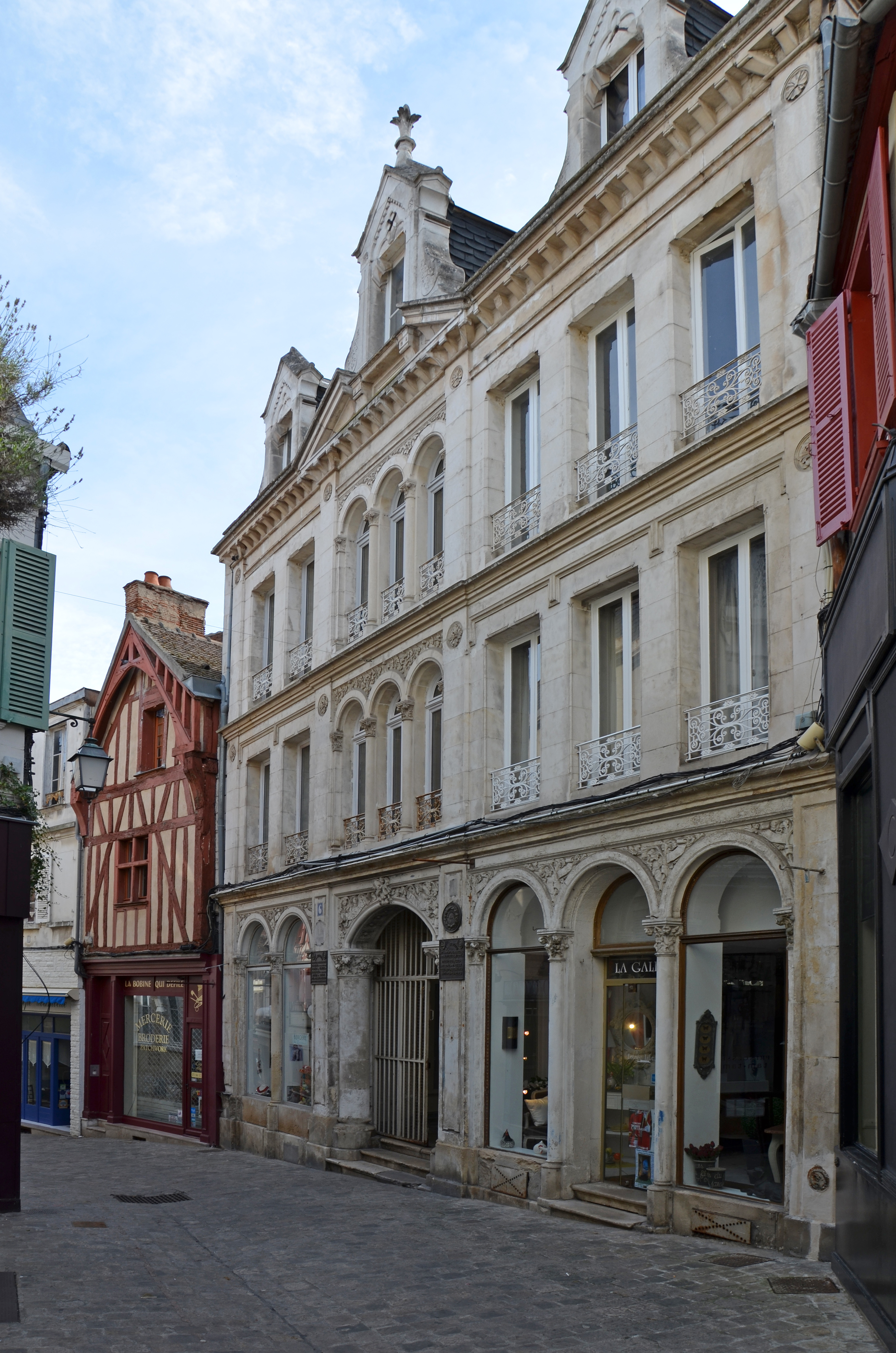 Passage couvert Manifacier à Auxerre, Yonne, Bourgogne, France